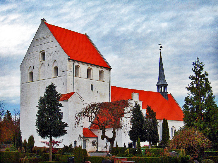 fra sydvest